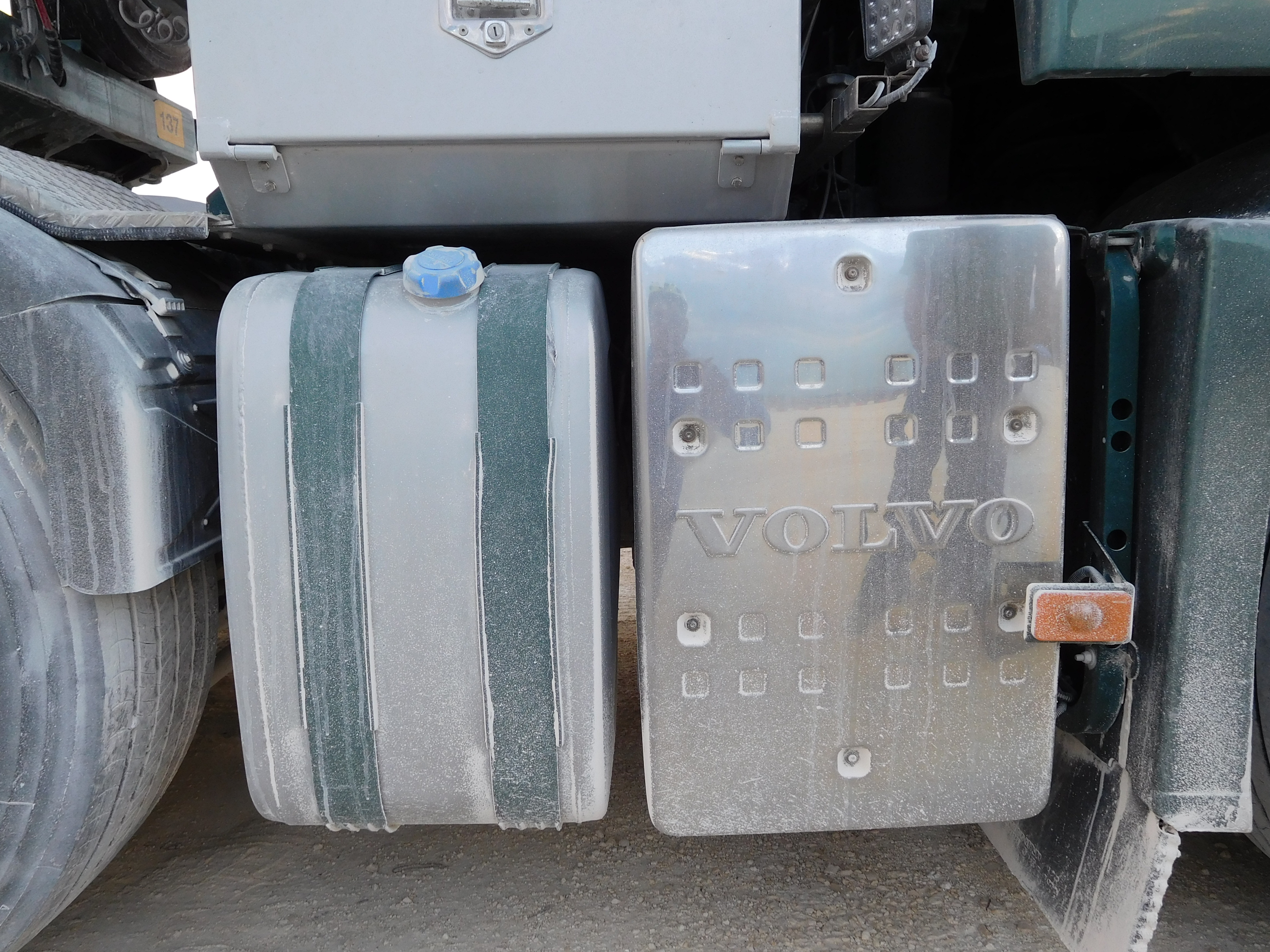 Réservoir d'AdBlue (en bas à gauche) d'un camion semi-remorque Volvo FH13 de 520 ch de 2009 ; l'injection de l'AdBlue se fait dans l'élément à droite. Le réservoir de carburant est en haut.